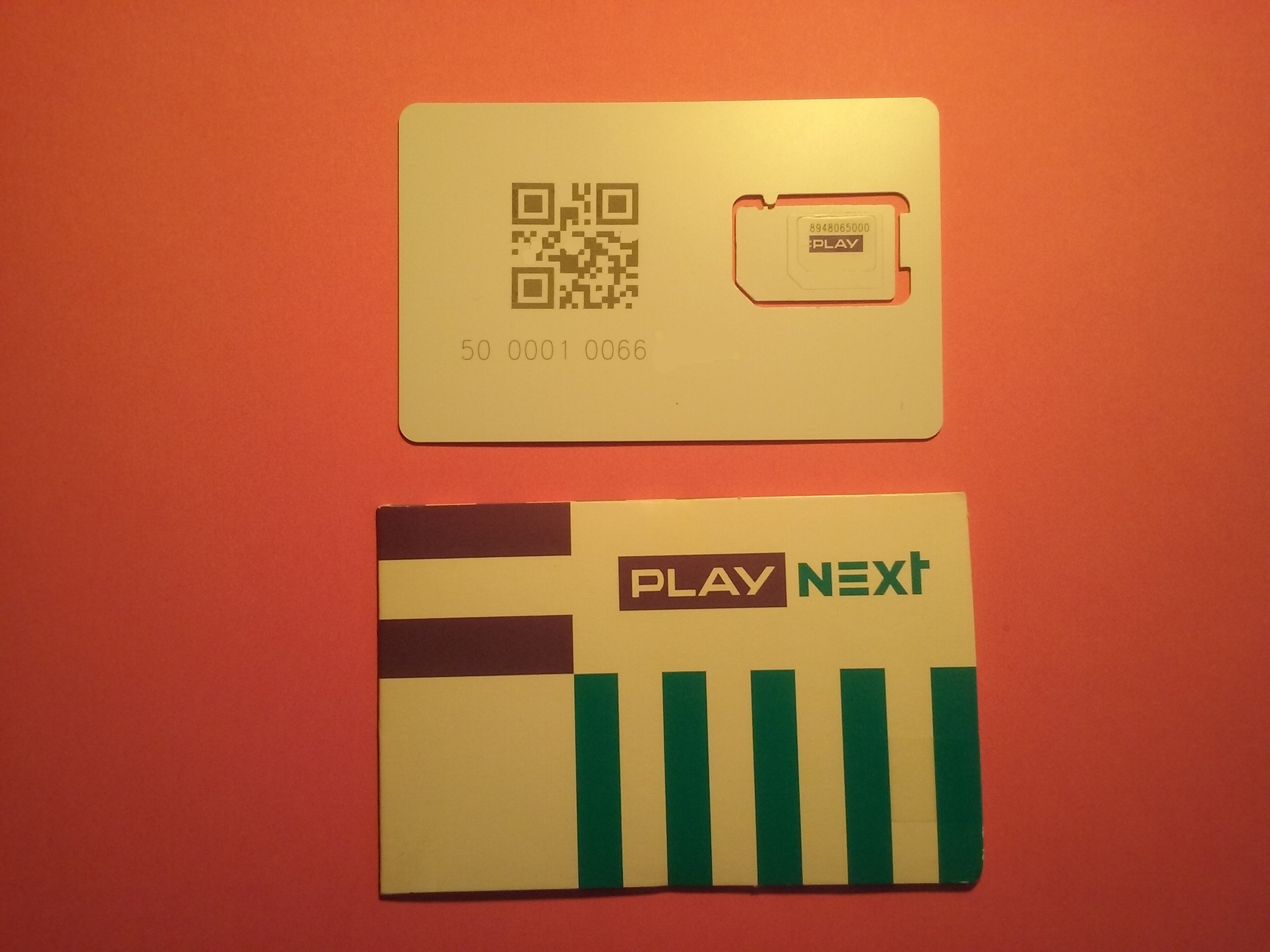 Karta SIM Play Next w holderze